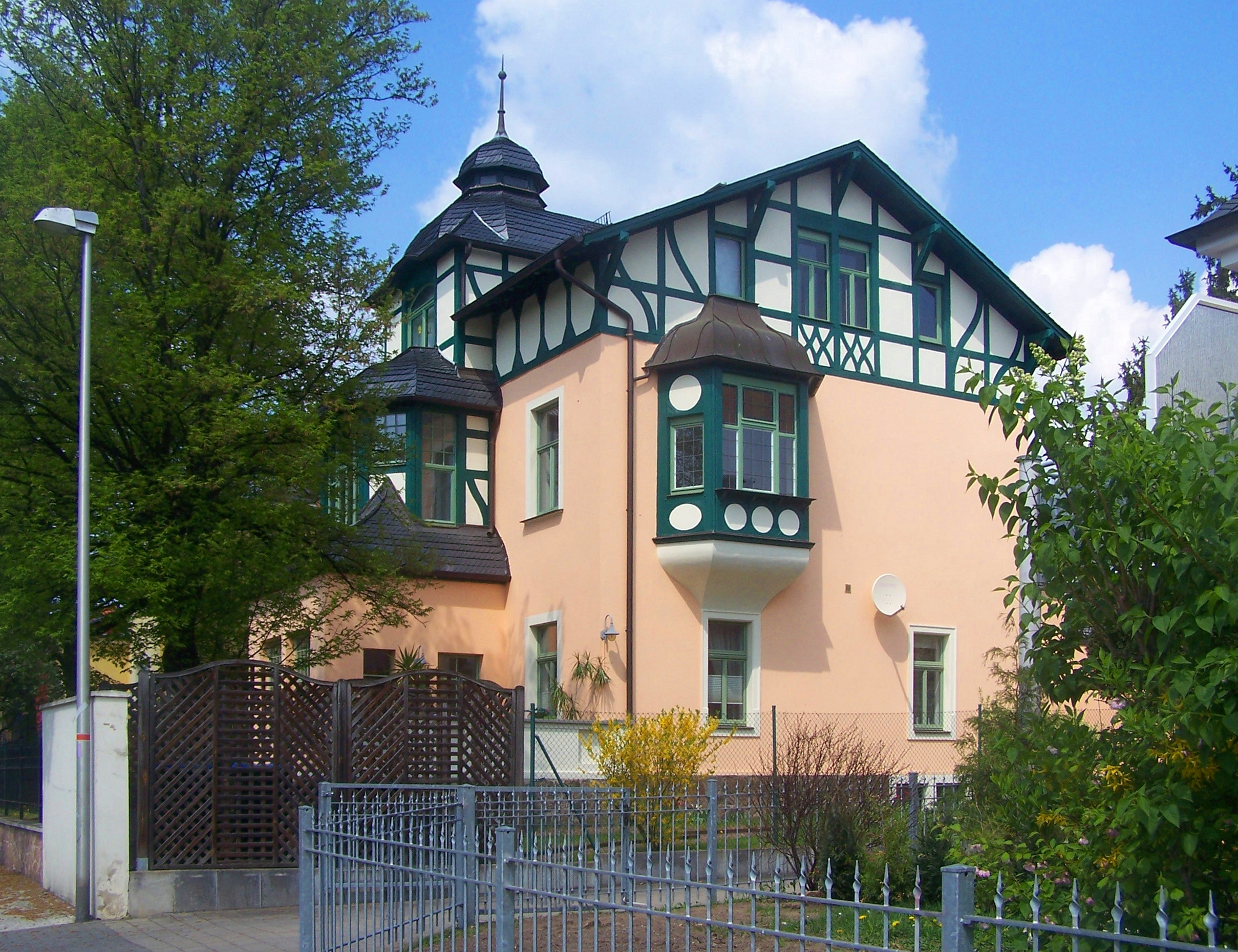 Mietvilla Gellertstraße 7 (Villa Selma) in Radebeul